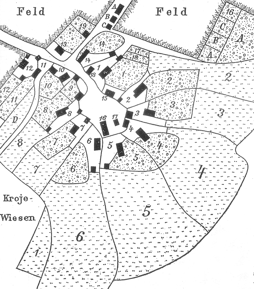 Grundstücksplan von Brechtorf von 1759. Die Nr. sind: 1-8 Ackerleute, 7-11 Halbspänner, 11 und 15 und 16 und D Stückenköter, A und B und C Anbauer, 17 Schule, 18 Schäfer, 19 Kuh- und Schweinehirt